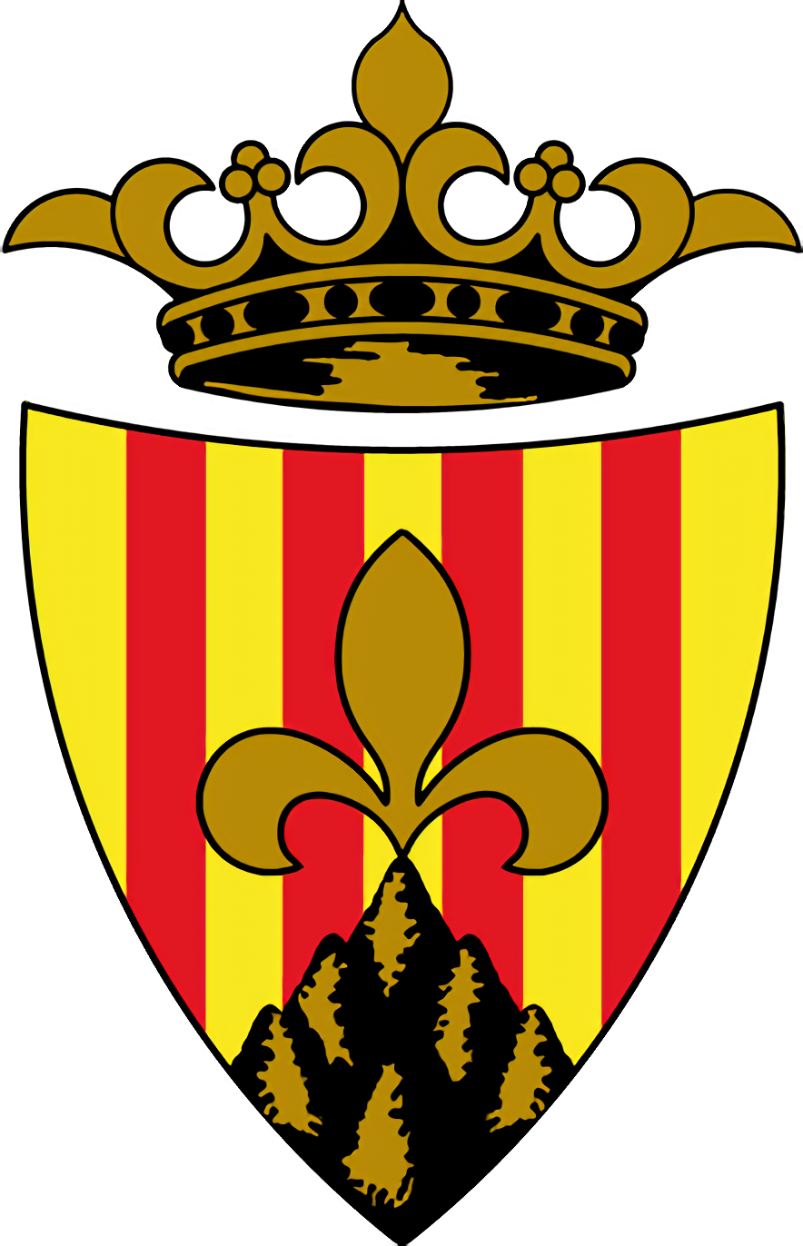 escut actual official agramunt si no en estreu segus aneu a la pagina web agramunt.cat